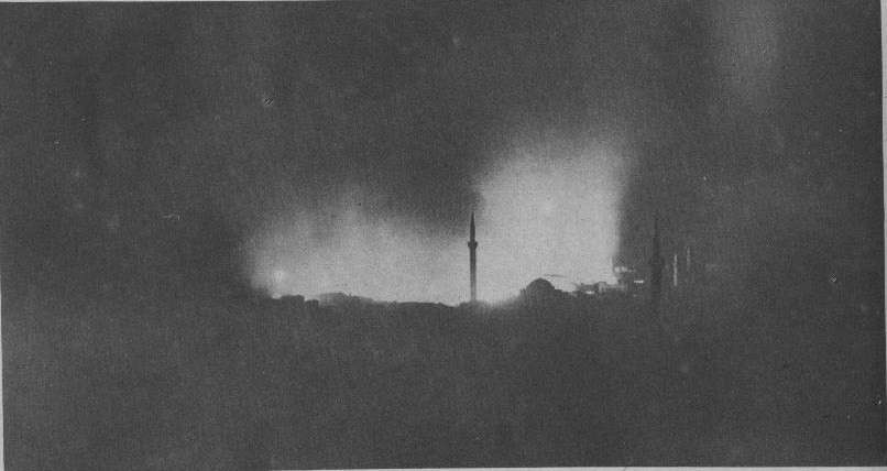 Grand incendie de la ville de Salonique.